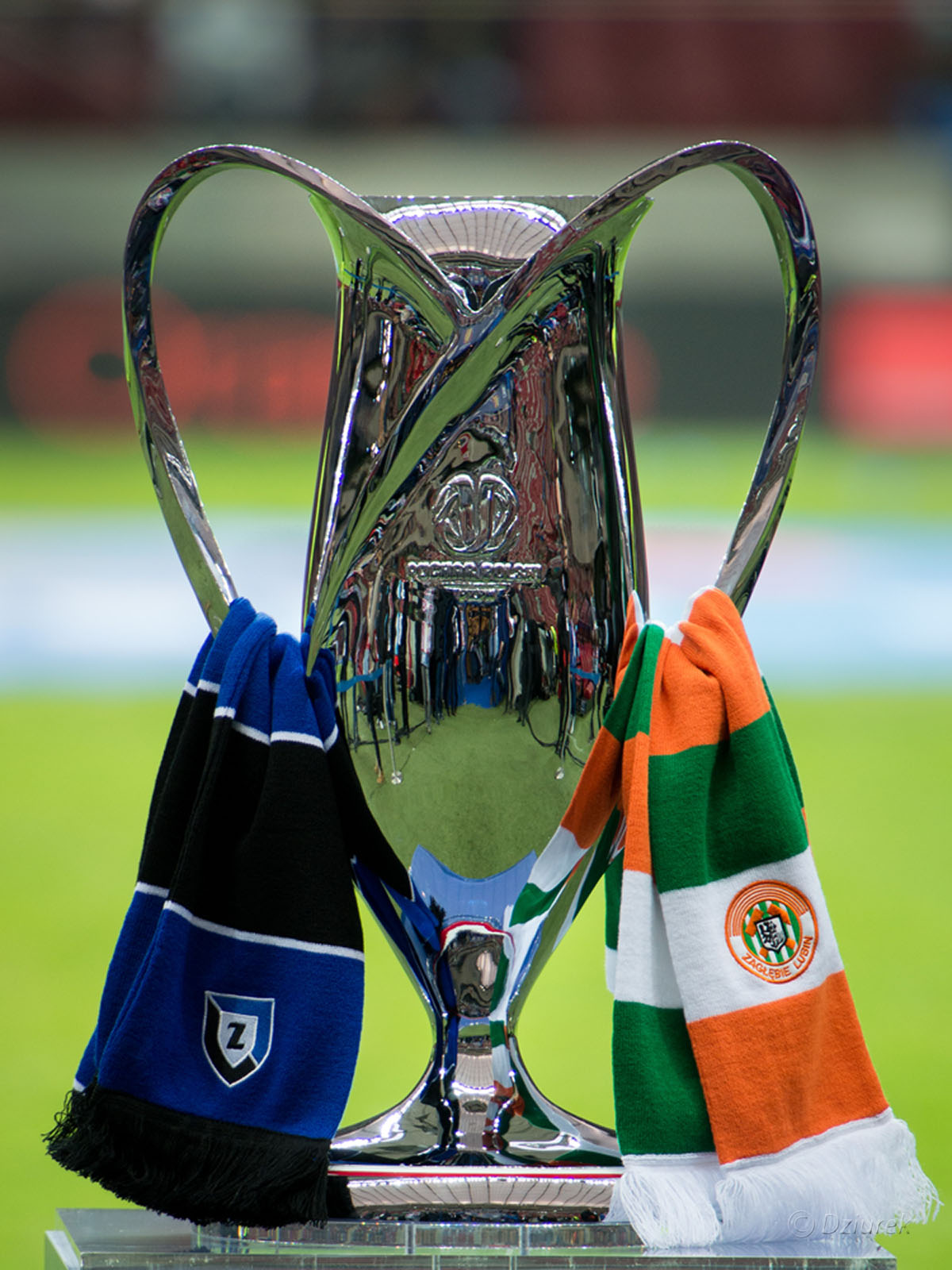 02.05.2014 Warszawa , final Pucharu Polski mecz KGHM Zaglebie Lubin - Zawisza Bydgoszcz , n/z puchar fot. P. Dziurman